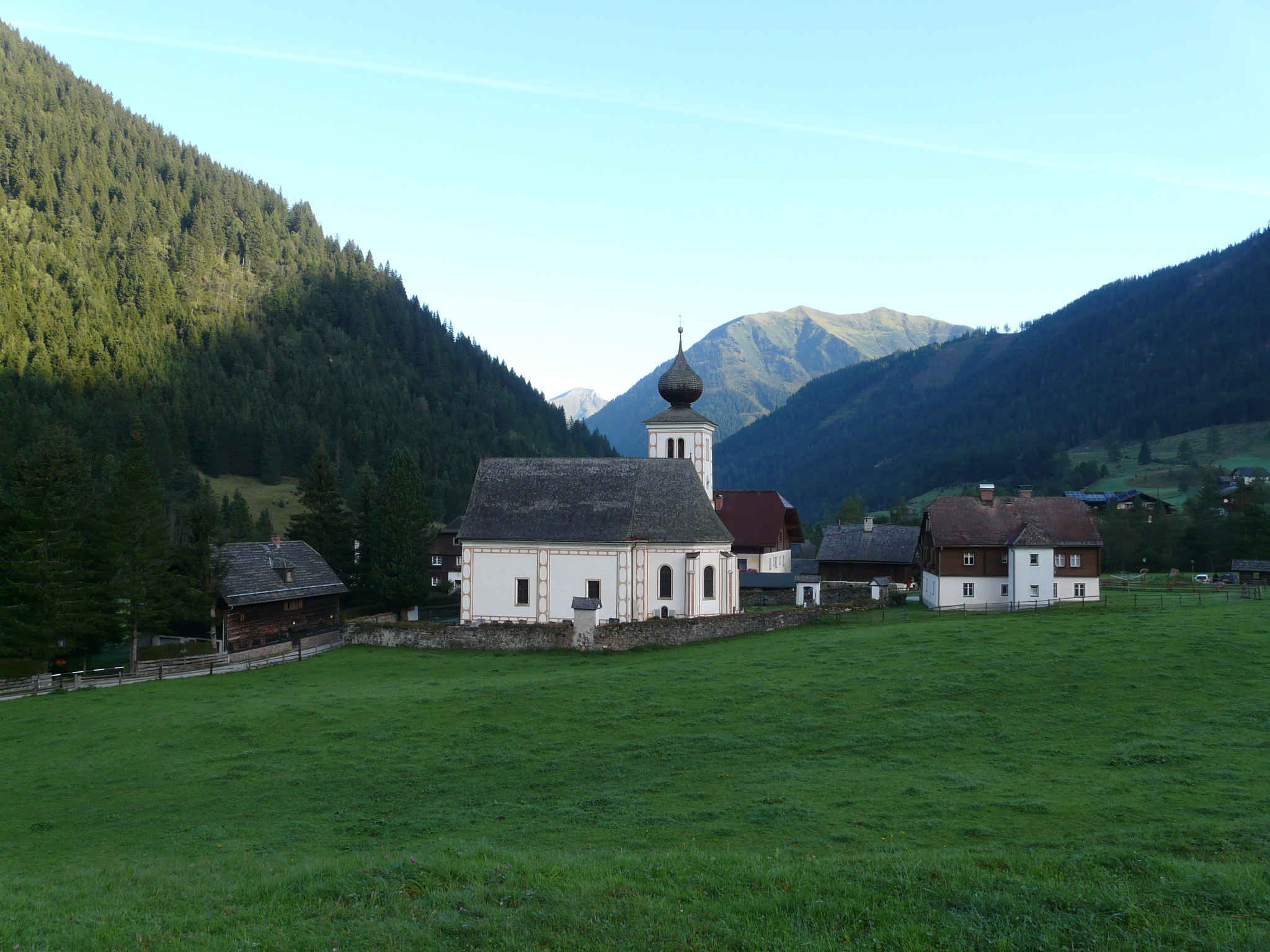 Pfarrkirche hl. Nikolaus in St. Nikolai im Sölktal. Blick in nördliche Richtung.